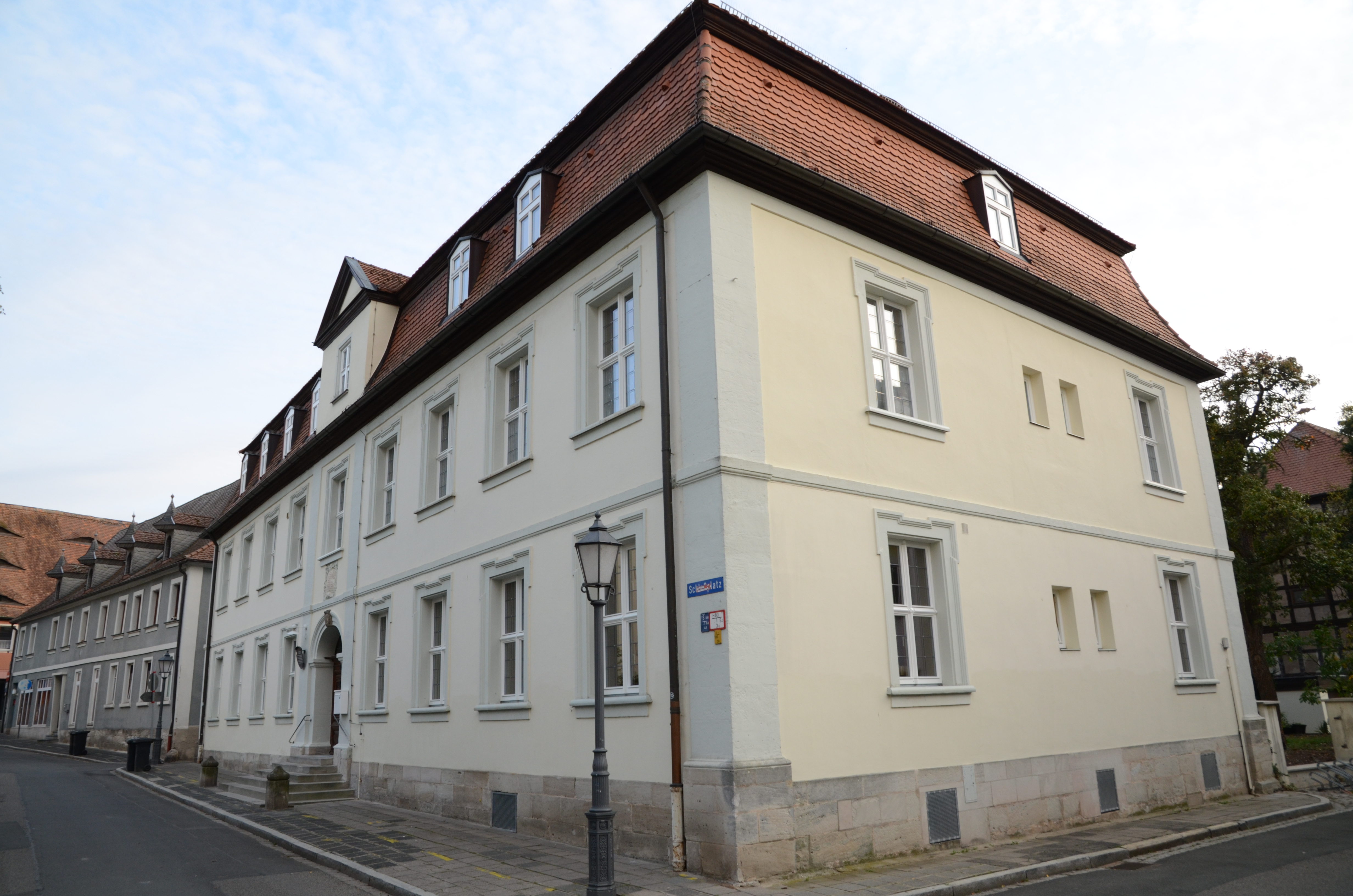 Neustadt an der Aisch Schlossplatz 1, evang.-luth. Dekanat